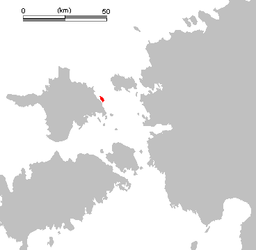 Vohilaid